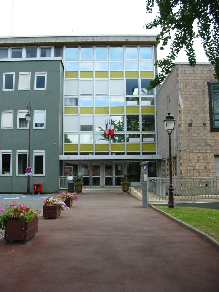 Description: Antony, Hôtel de ville, le 31 juillet 2005 Source: Hermione12 Licence: GFDL Hermione12